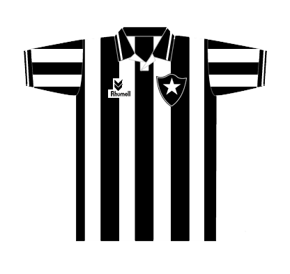 Camisa do Botafogo de 1994, usada na recopa sul-americana 1994